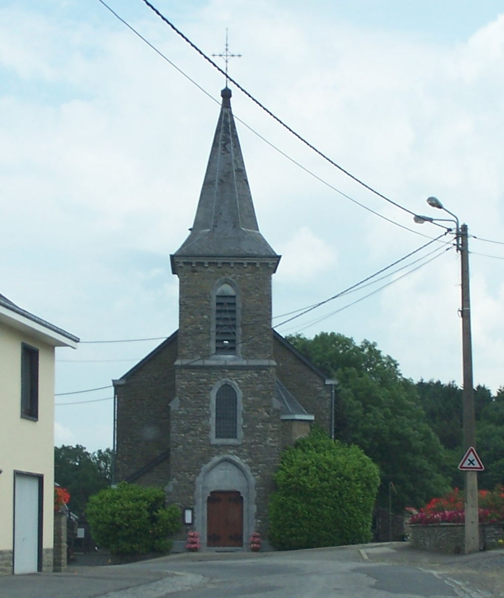 Kerk Steinbach (Waals: Stambè), een kern in de gemeente Gouvy (België, provincie Luxemburg).